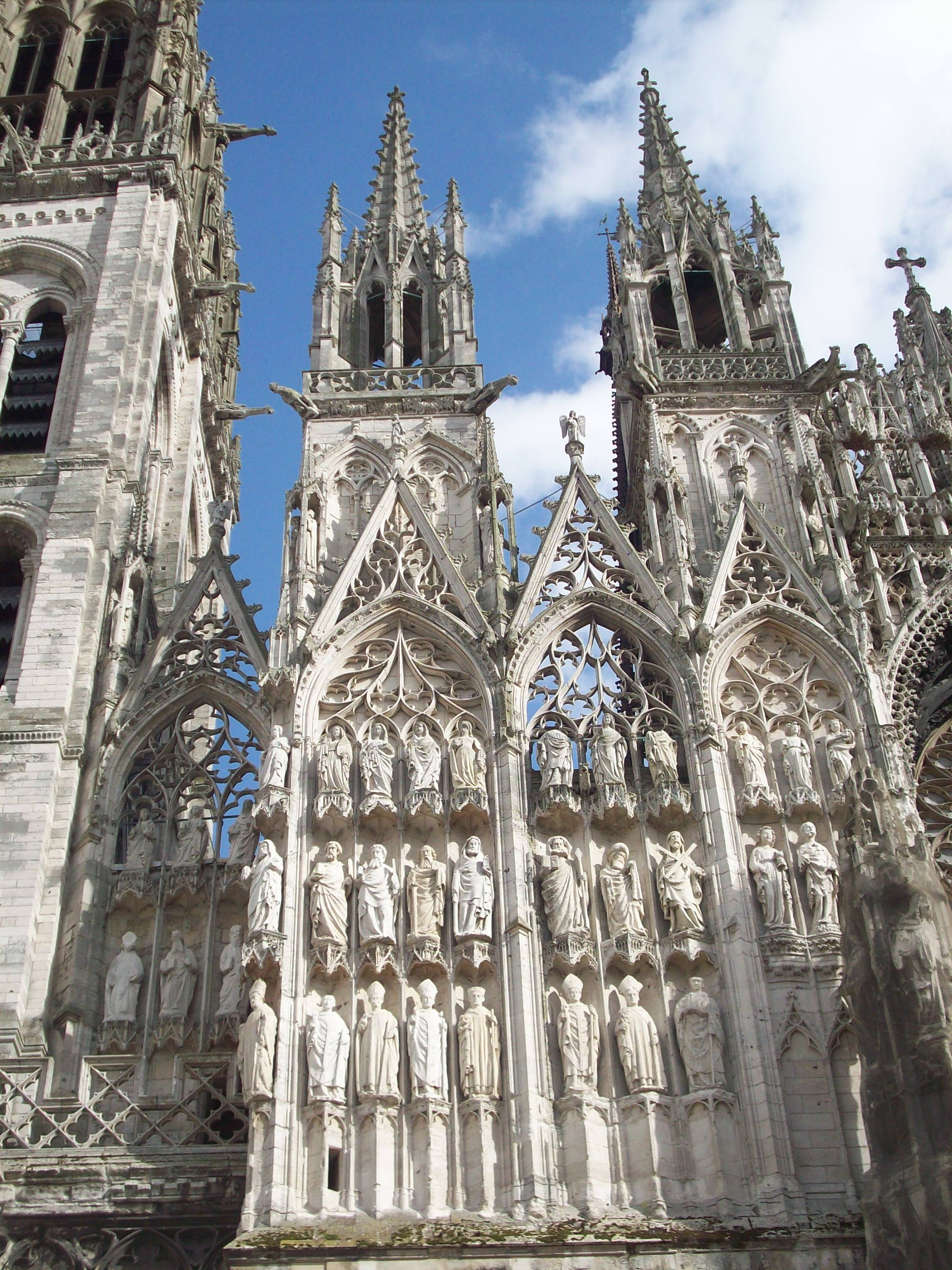 Statues sur la façade occidentale, au dessus du portail Saint-Jean.